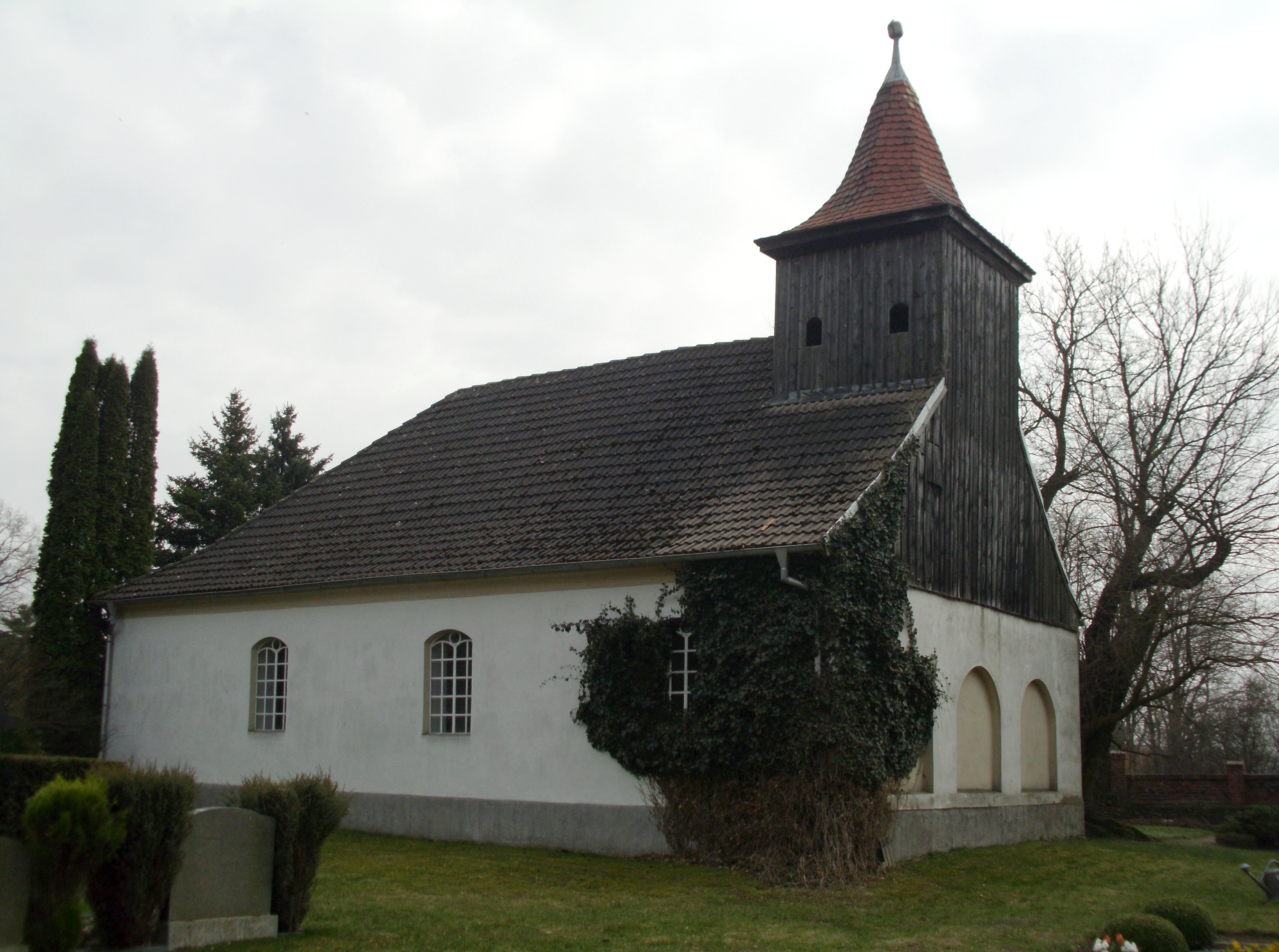 Kirche in Birkholz, an der Kirche ein geschützter Maulbeerbaum, gepflanzt im Jahre 1790. Bei Beeskow, Brandenburg.